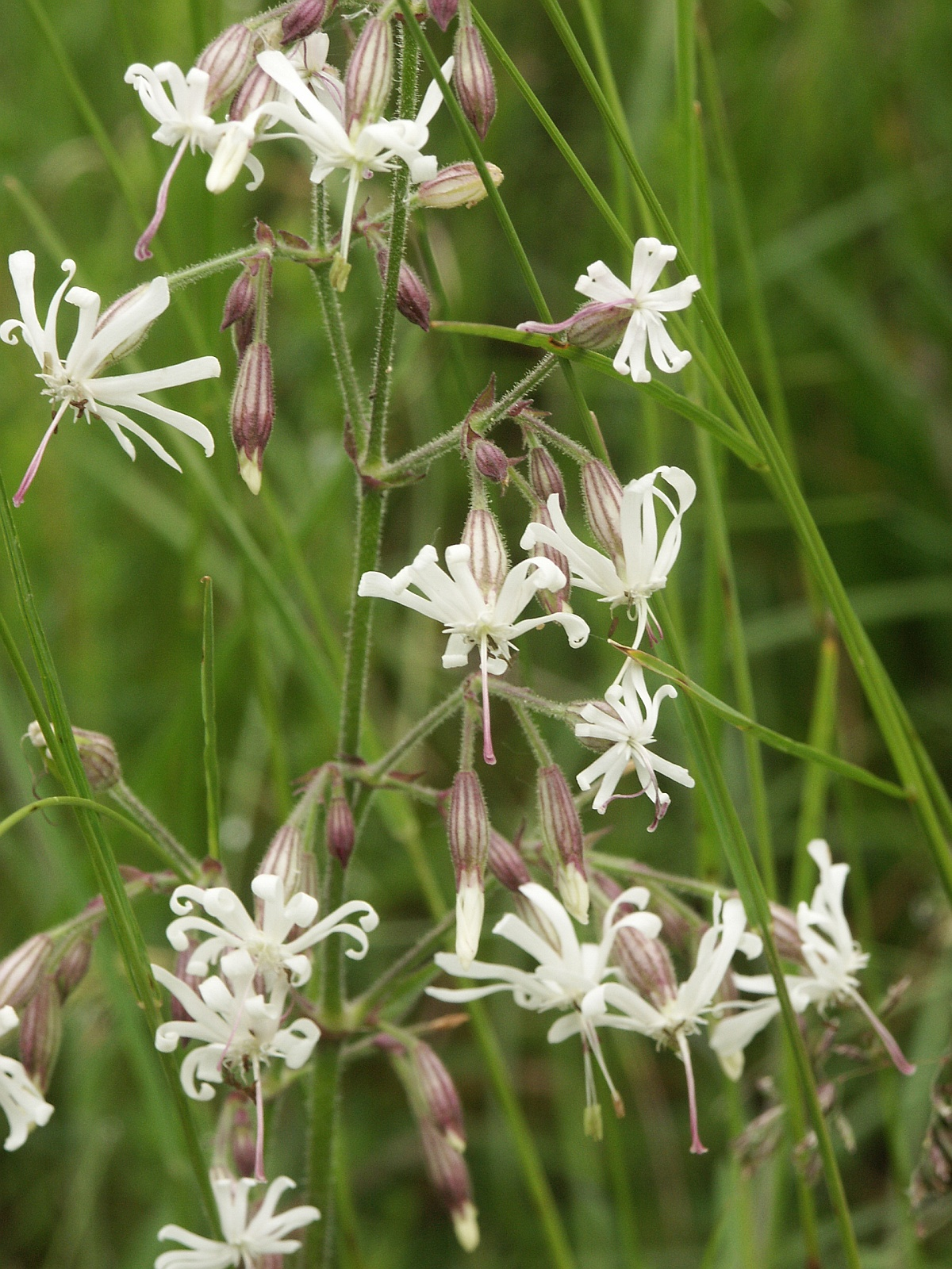 Silene nutans, Schwäbisch-Fräkischer Wald, Germany